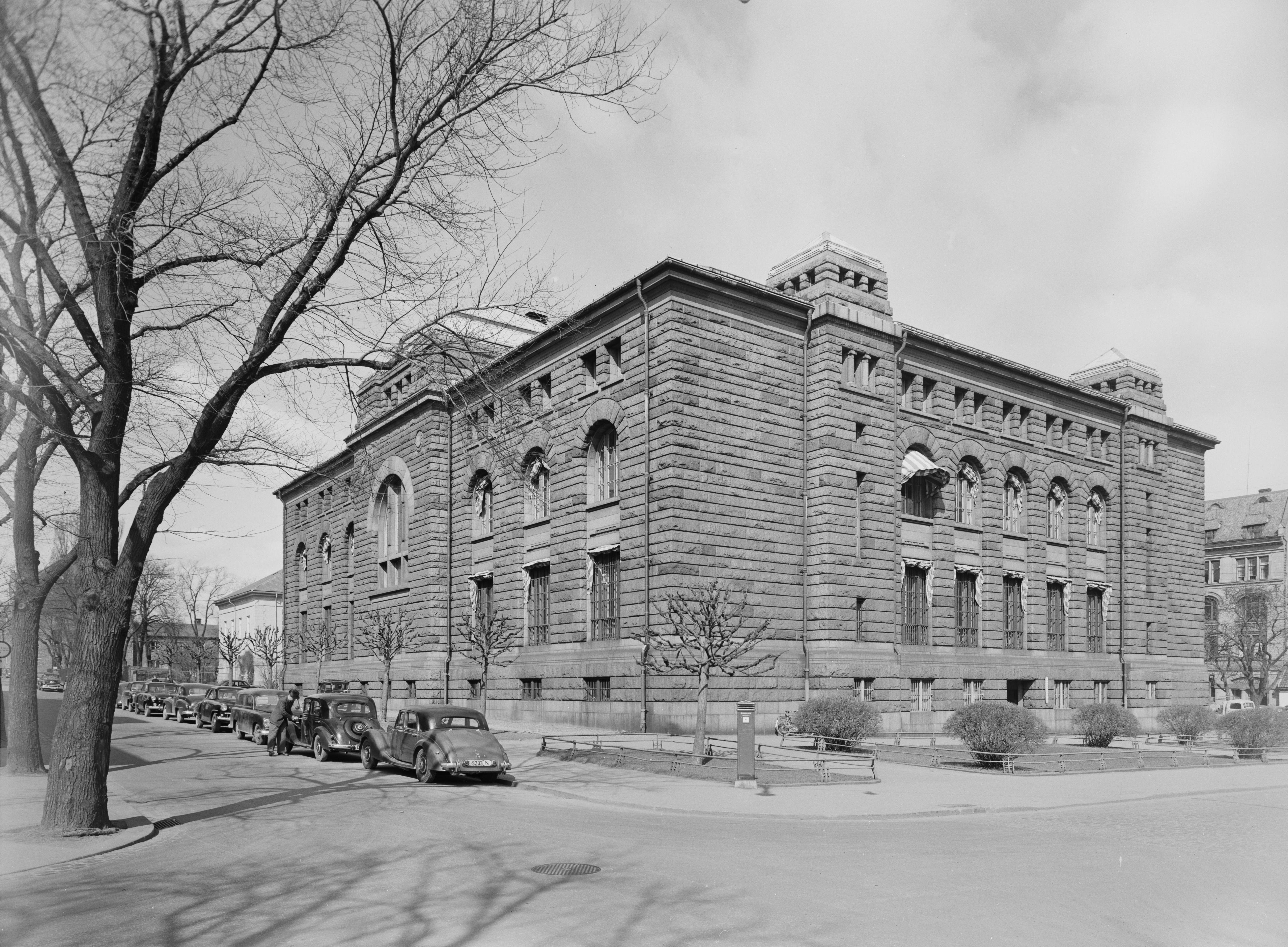 Bildet er hentet fra Nasjonalbibliotekets bildesamling Bankplassen,Oslo, Oslo, Oslo